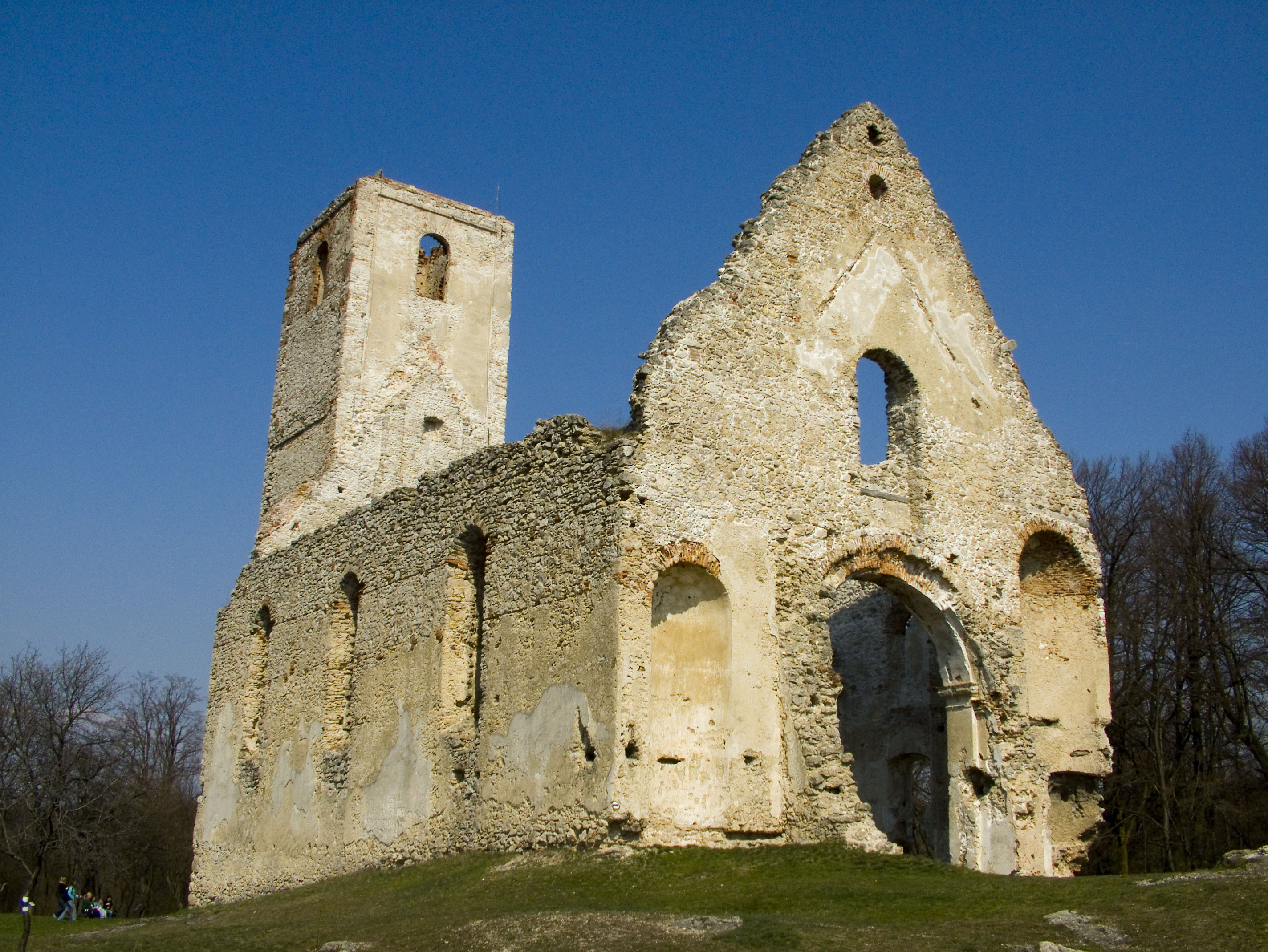 Katarínka. Zrúcanina kostola a kláštora sv. Kataríny. Po konzervácii štítu a kostolnej veže.